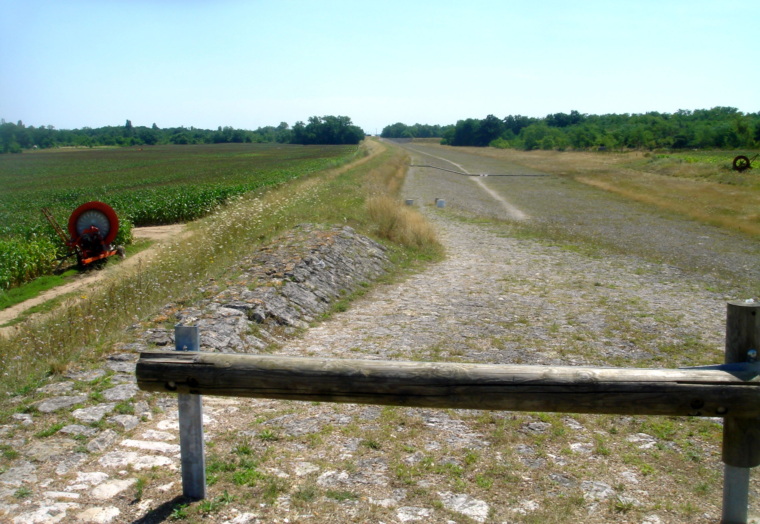 Déversoir de Jargeau, Loiret, France Vallée de la Loire